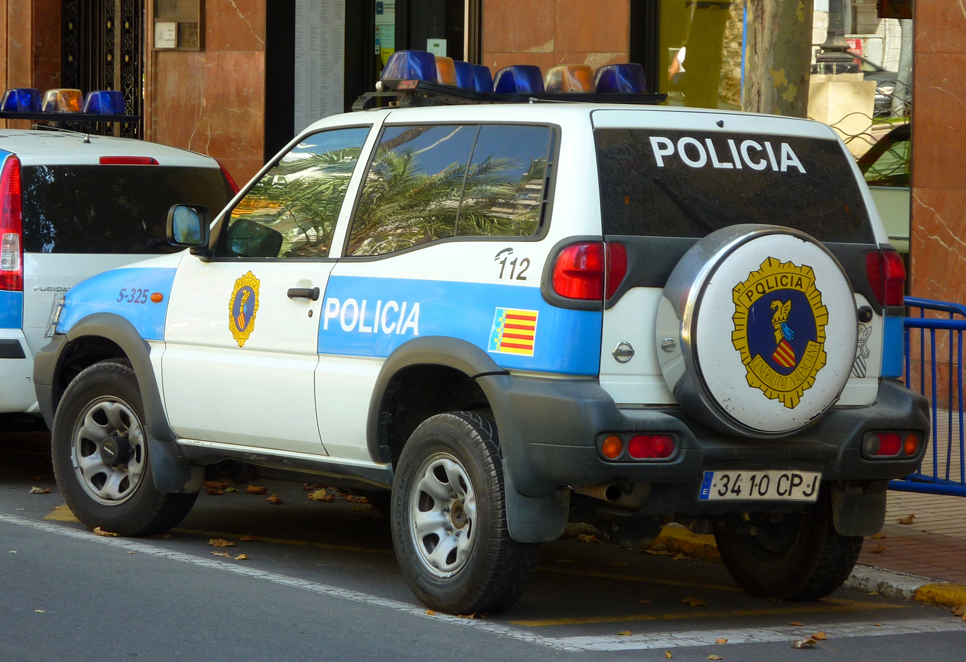 Nissan Terrano de la Policía de la unidad del CNP asignada a la Generalitat Valenciana.